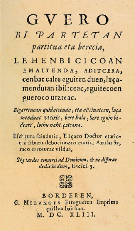 Pedro Axularren Guero-ren lehenbiziko argitaraldiaren azala (Bordele, 1643).